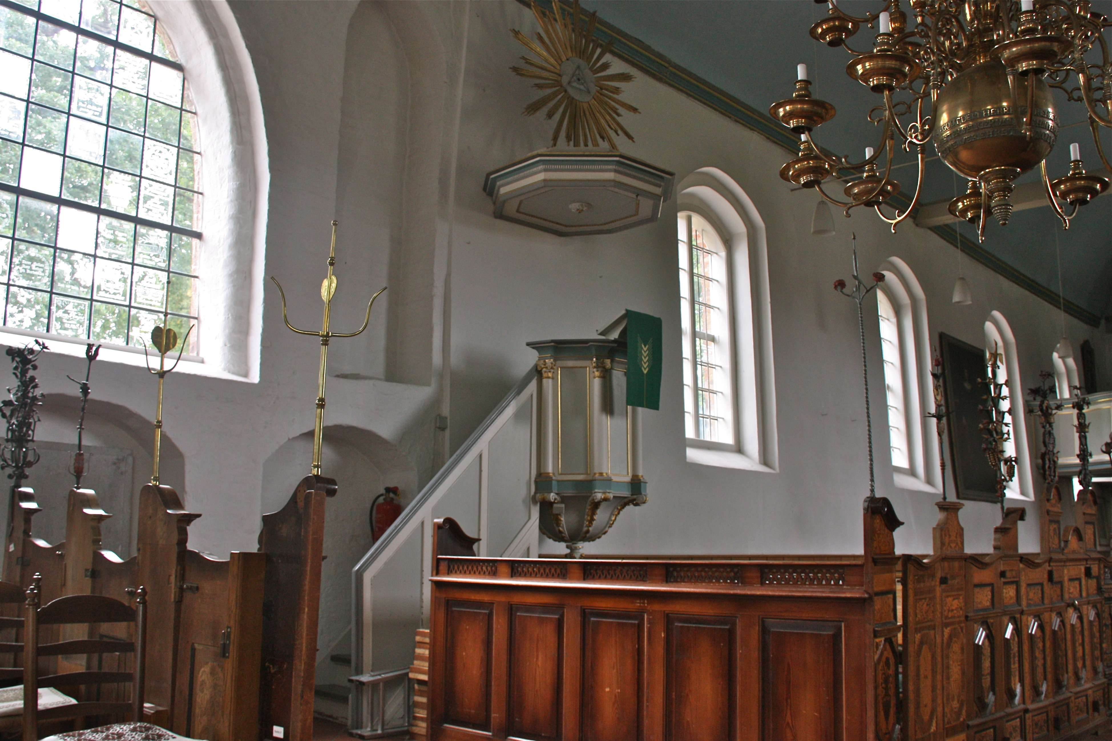 Sankt Johannis, Hamburg-Neuengamme, Innenansicht in Richtung KanzelThis is a photograph of an architectural monument.